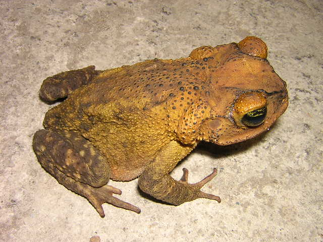 Bufo taladai